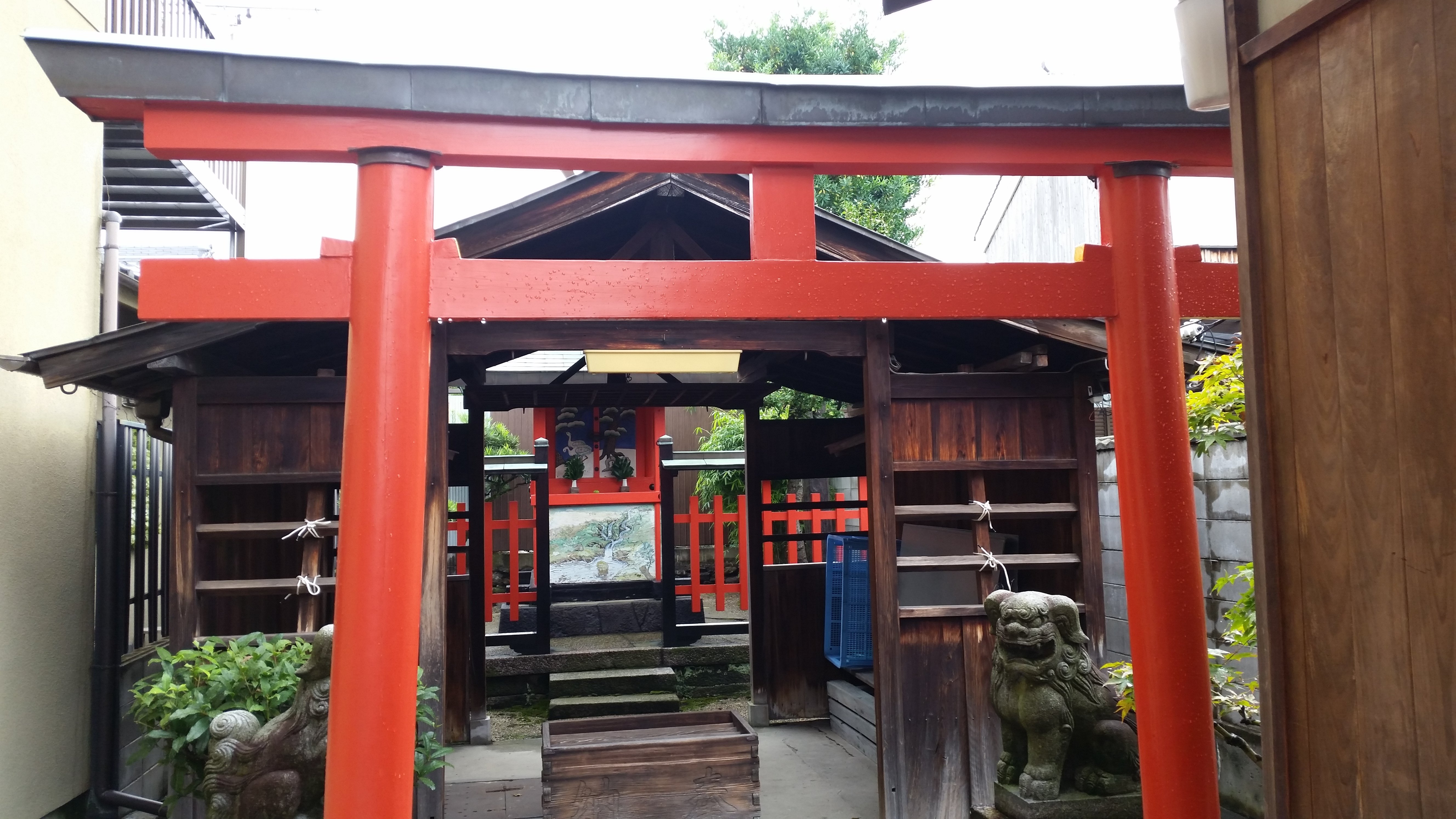 住吉神社拝殿、奈良